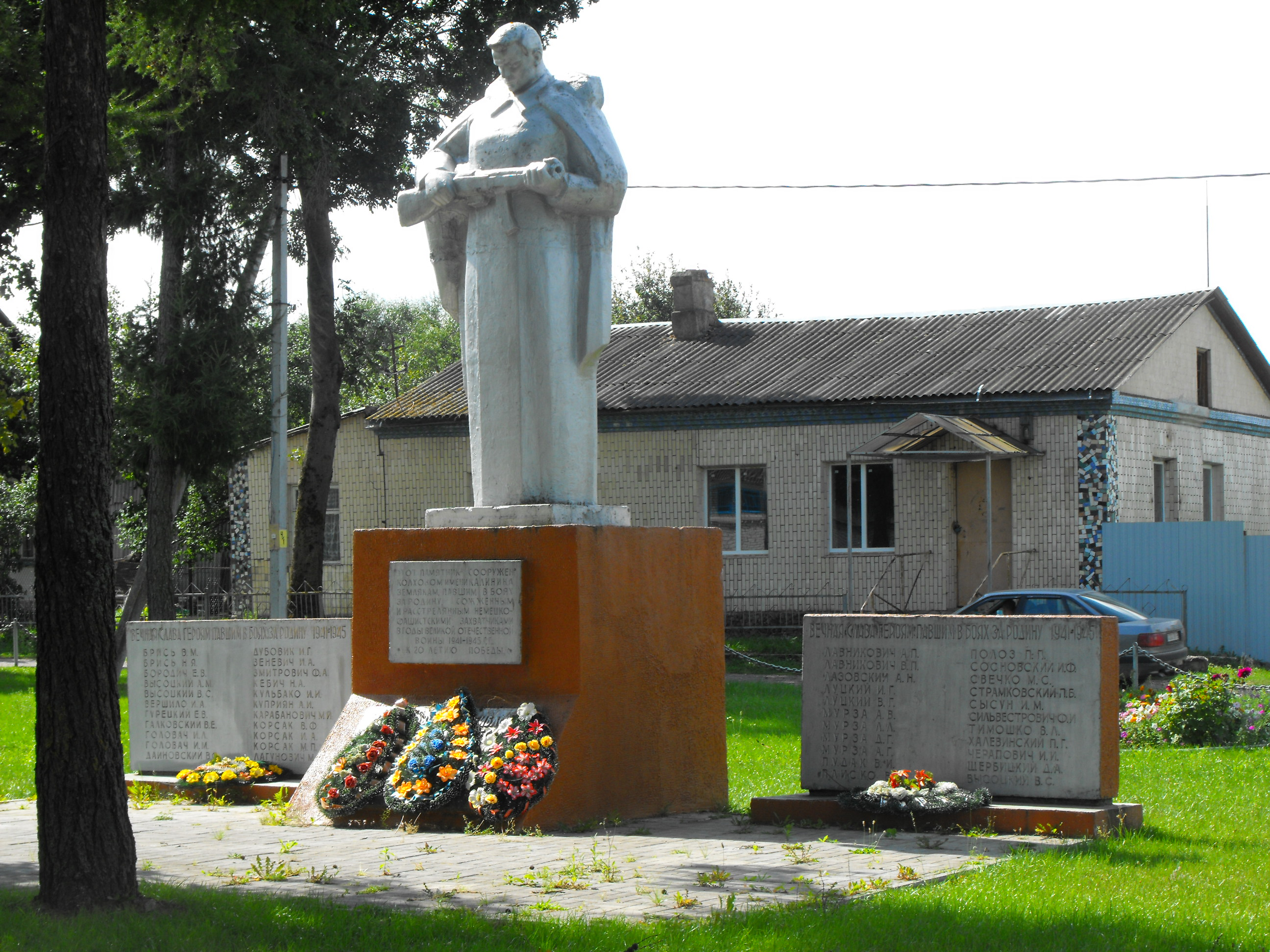 Деревня Городок, Молодечненский район. Август 2012 года.